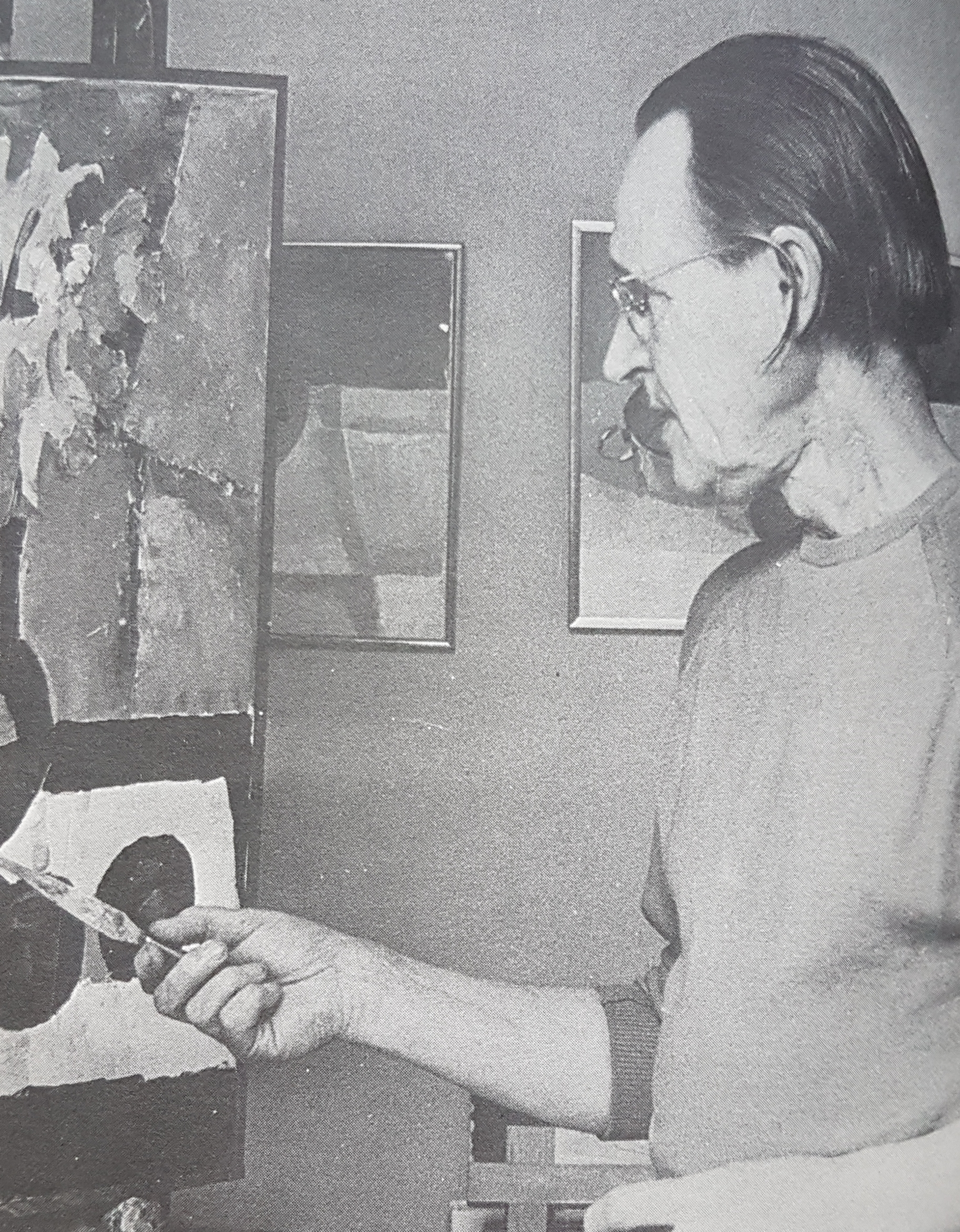 Helge Frender Artist.from Sweden